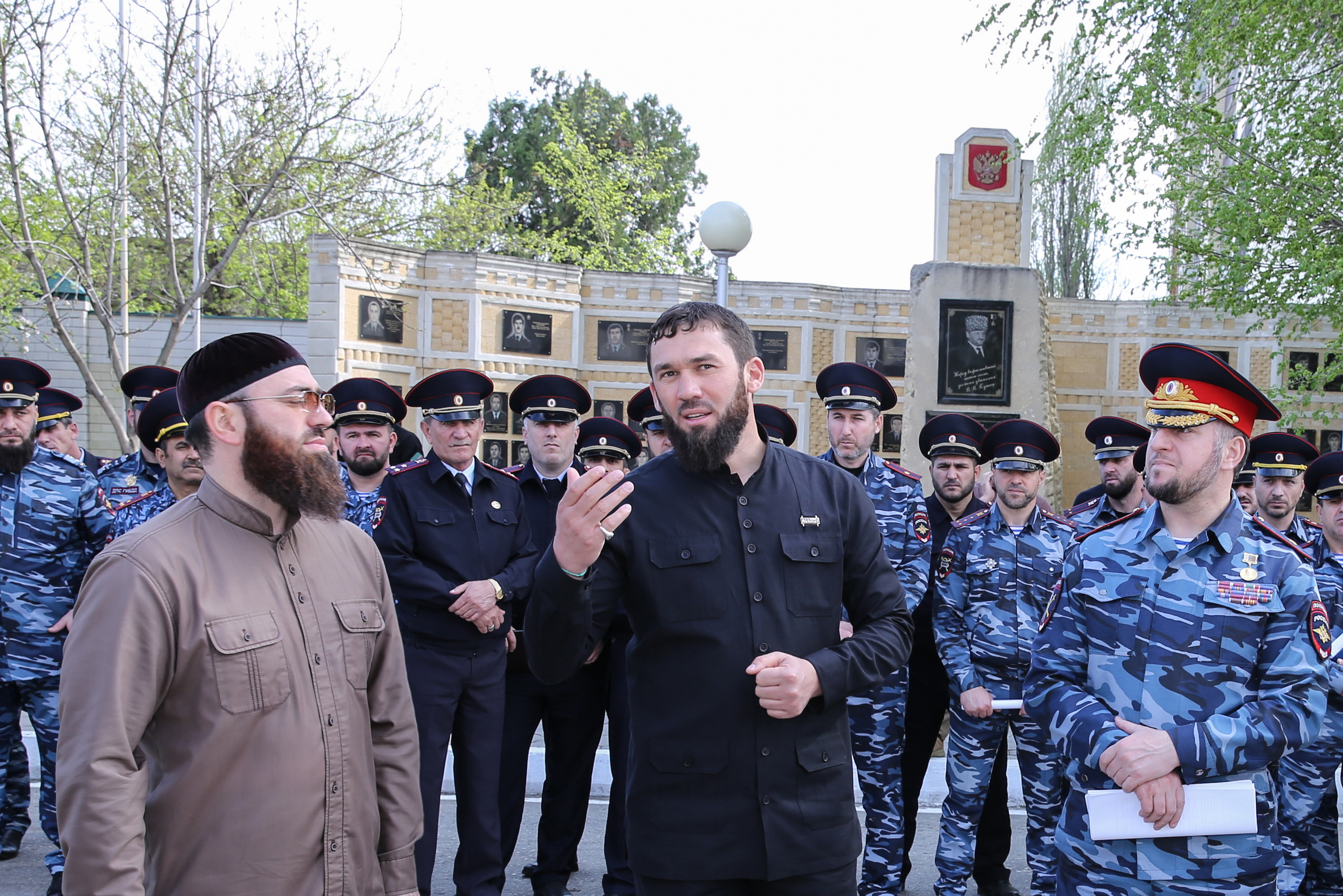 Председатель Парламента ЧР, руководитель Оперштаба по снижению аварийности и смертности на дорогах Магомед Хожахмедович Даудов